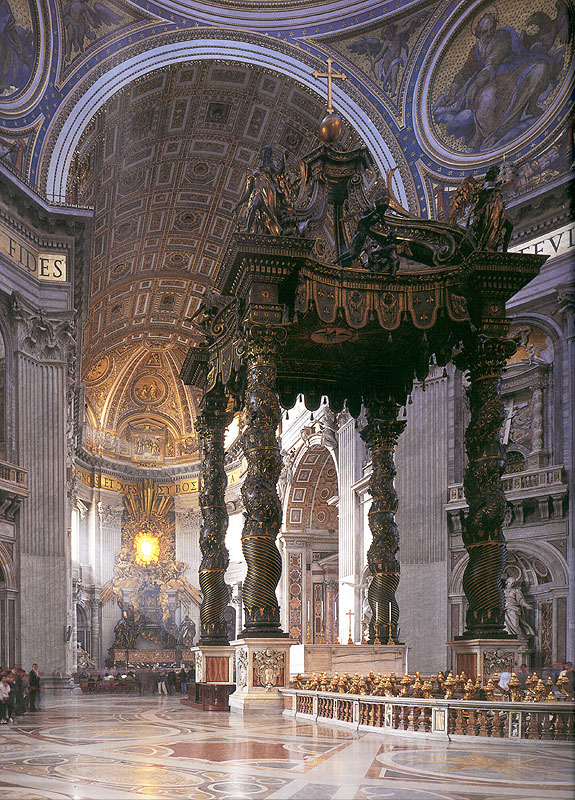 Il baldacchino di san Pietro del Bernini, in san Pietro in Vaticano.